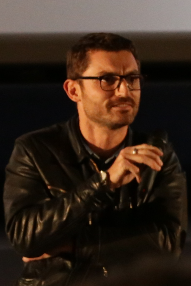 Lors de l'avant première du film Eyjafjallajökull